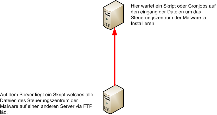 Dieses Diagram zeigt wie das Steuerungszentrum des Botnetzes in bewegung bleibt.